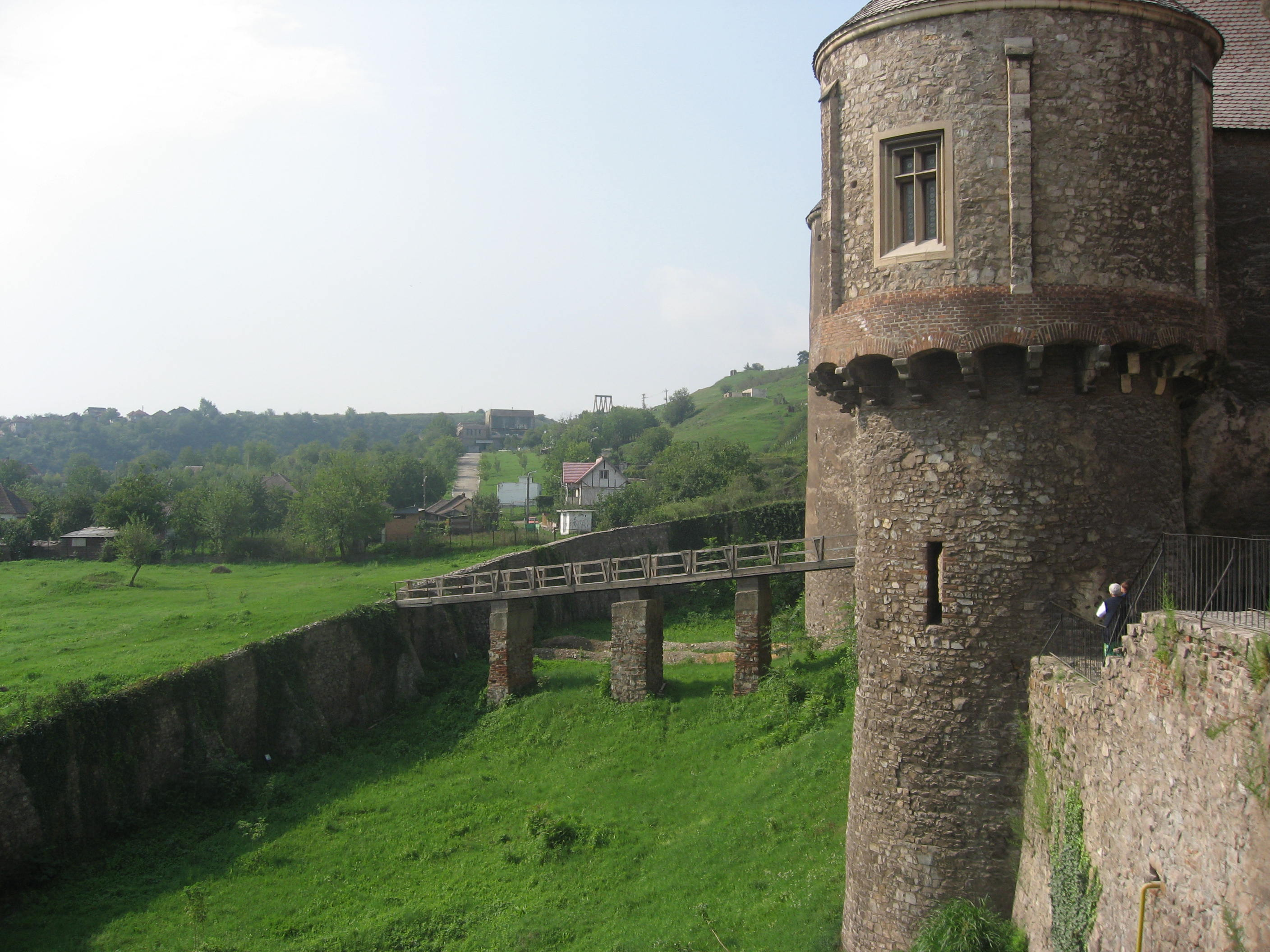 Hrad Hunedoara